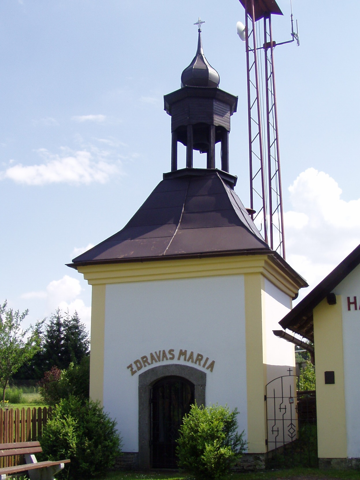 Kaple Panny Marie v Křižanově (Hořičky)